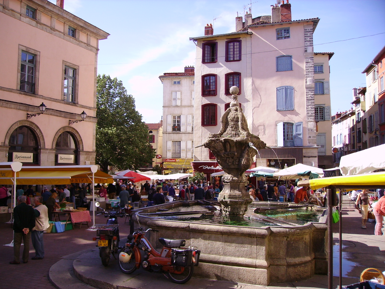 La ciudad turística de Le Puy-en-Velay (Alto Loira - Auvernia - Francia) tiene a su Catedral y al Hôtel-Dieu Saint-Jacques incluidos como Patrimonio de la Humanidad, formando parte del "Caminos de Santiago Francés" (Via Podiensis). Aquí se hace un precioso encaje de bolillos y se cultiva la lenteja verde y la verveine du Velay.